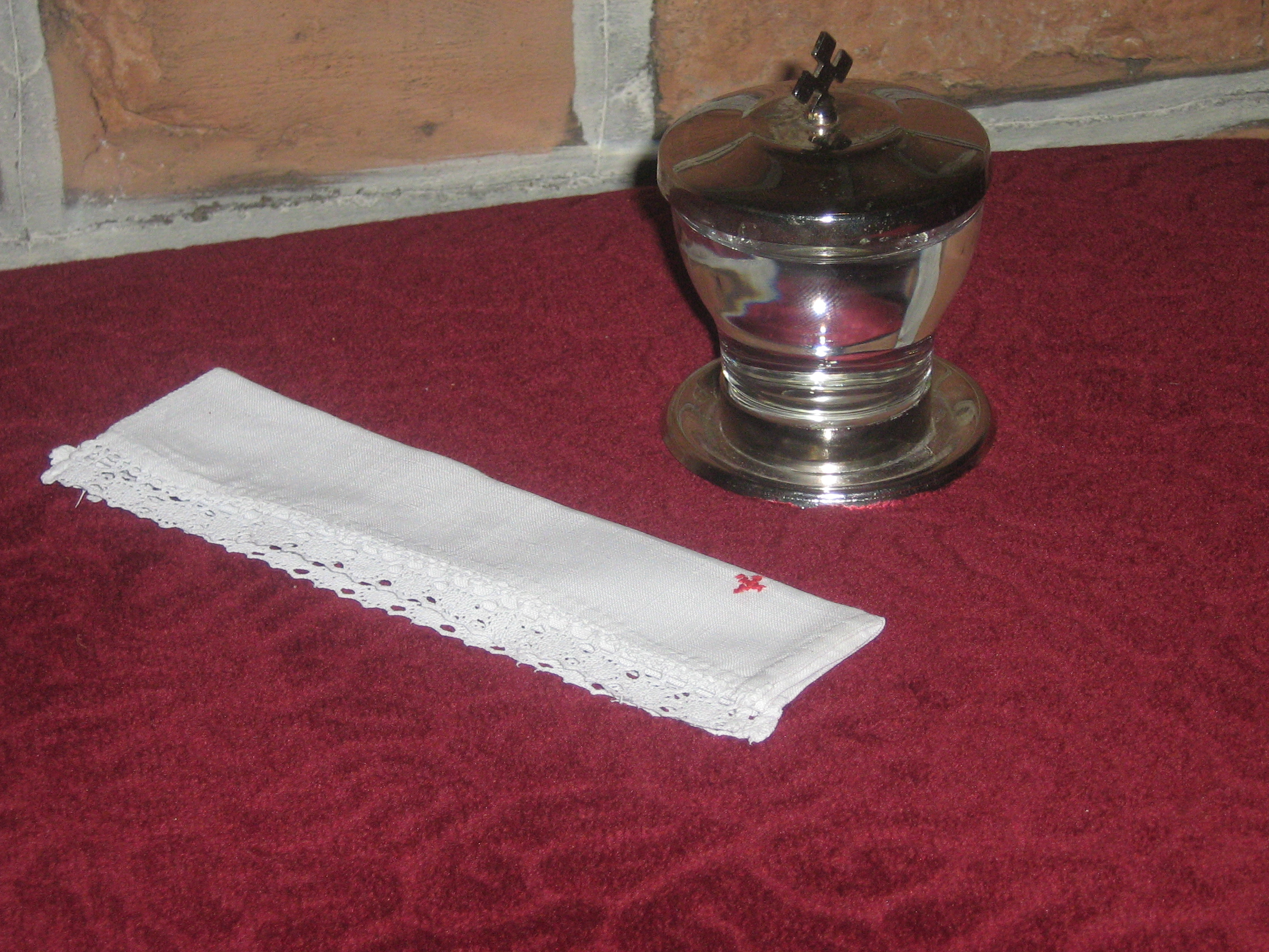 Vasculum